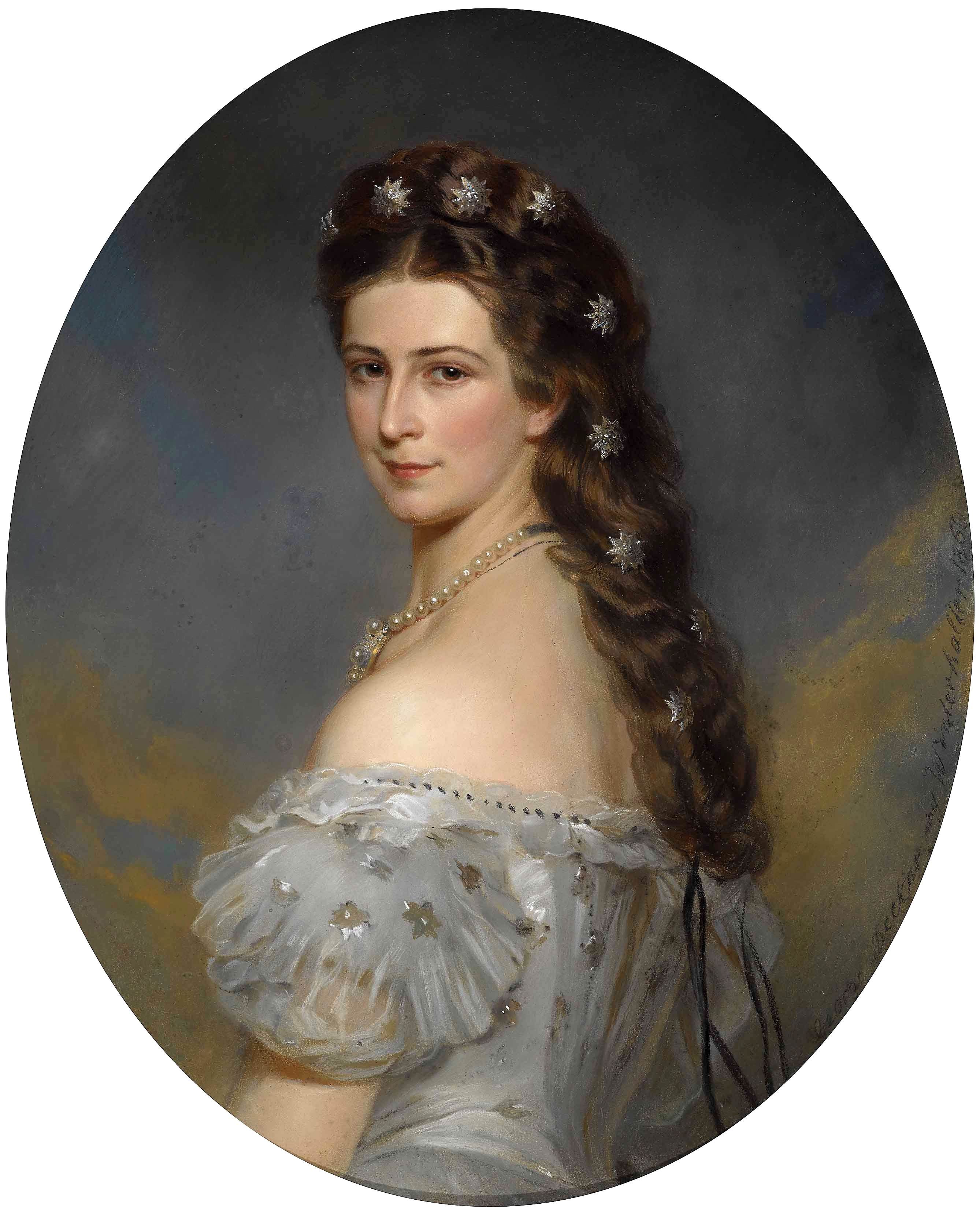 Kaiserin Elisabeth von Österreich